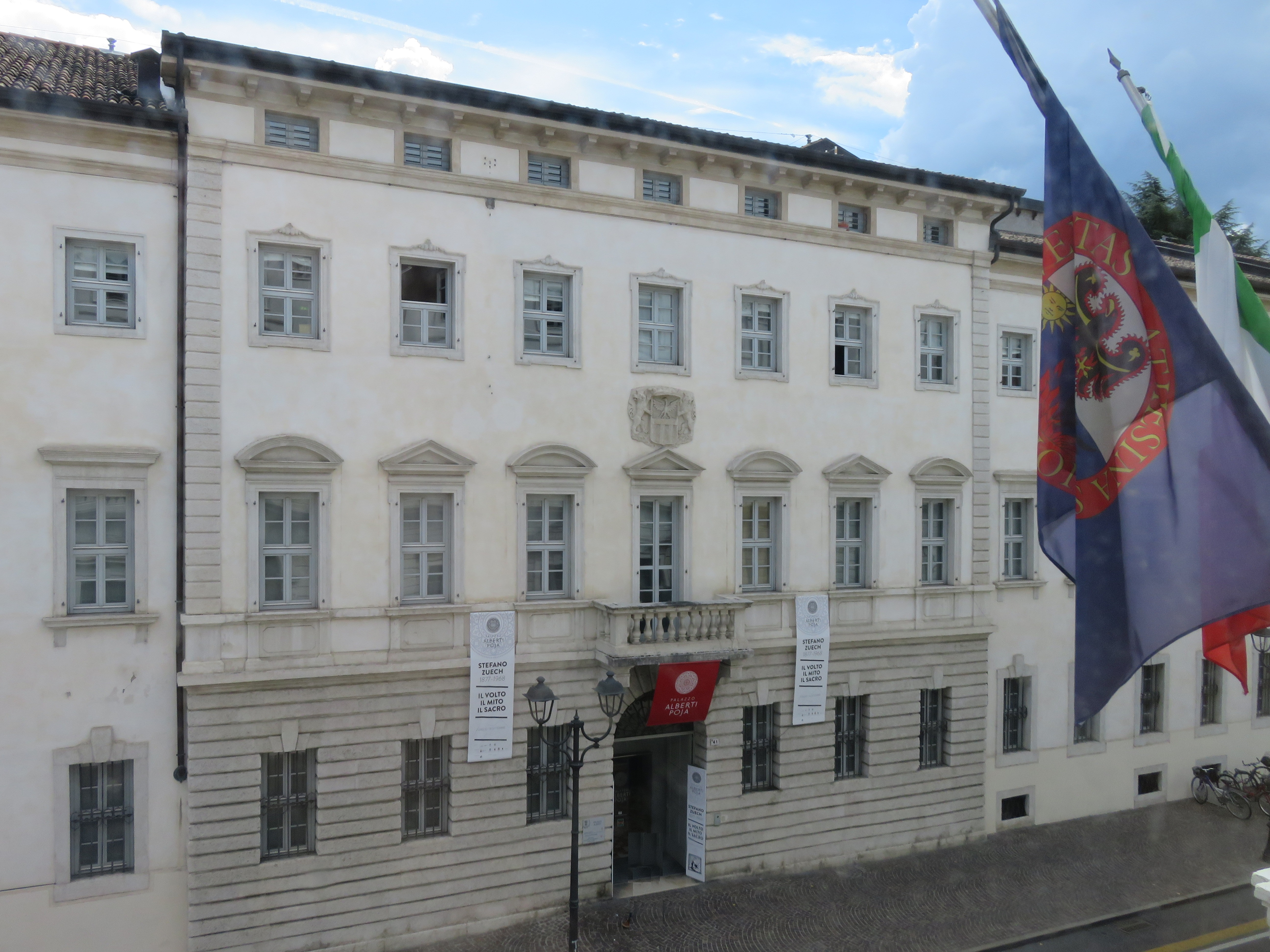 Facciata di Palazzo Alberti Poja su Corso Bettini